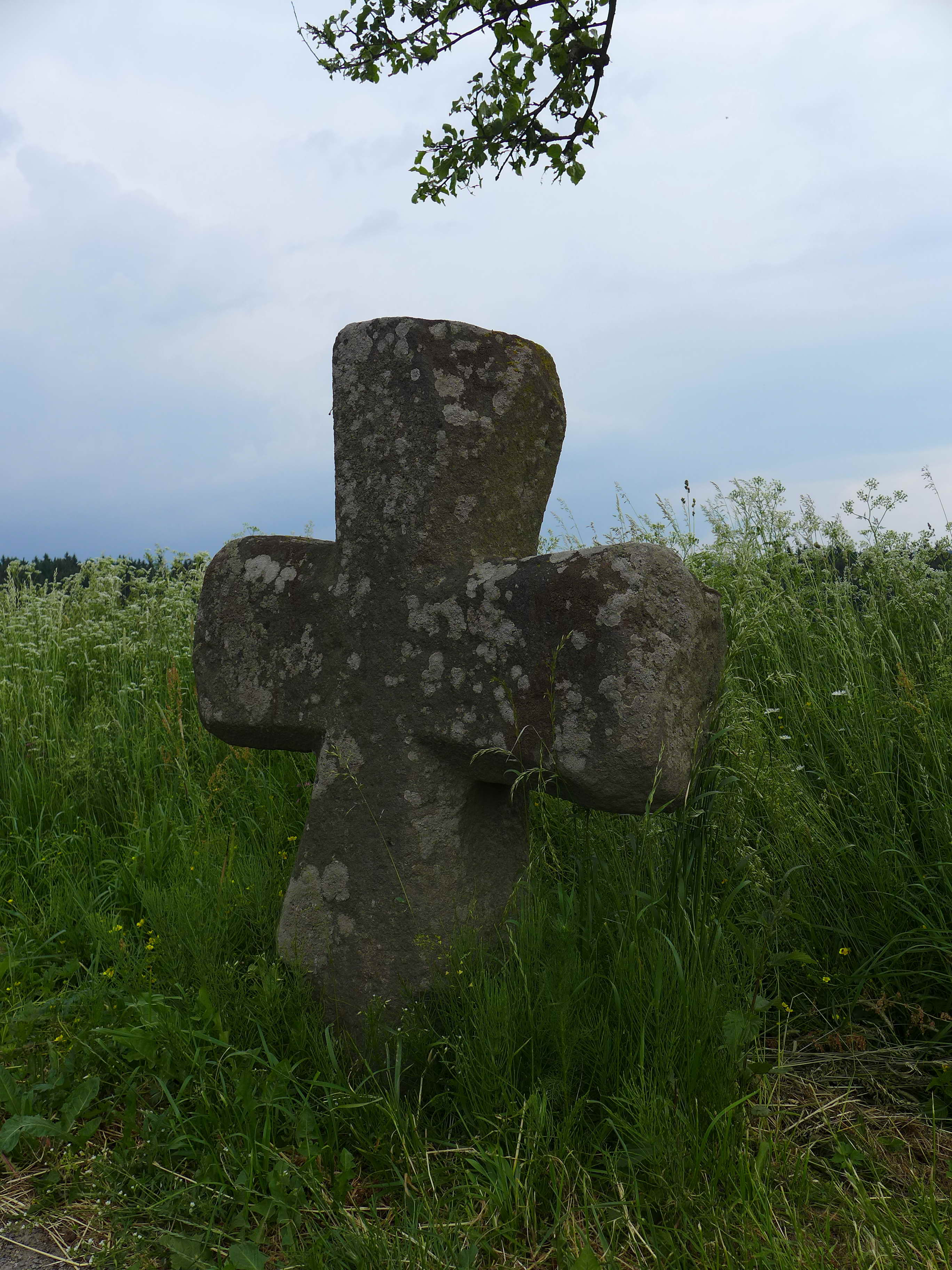 Smírčí kříž, při silnici na Stáj, Arnolec.